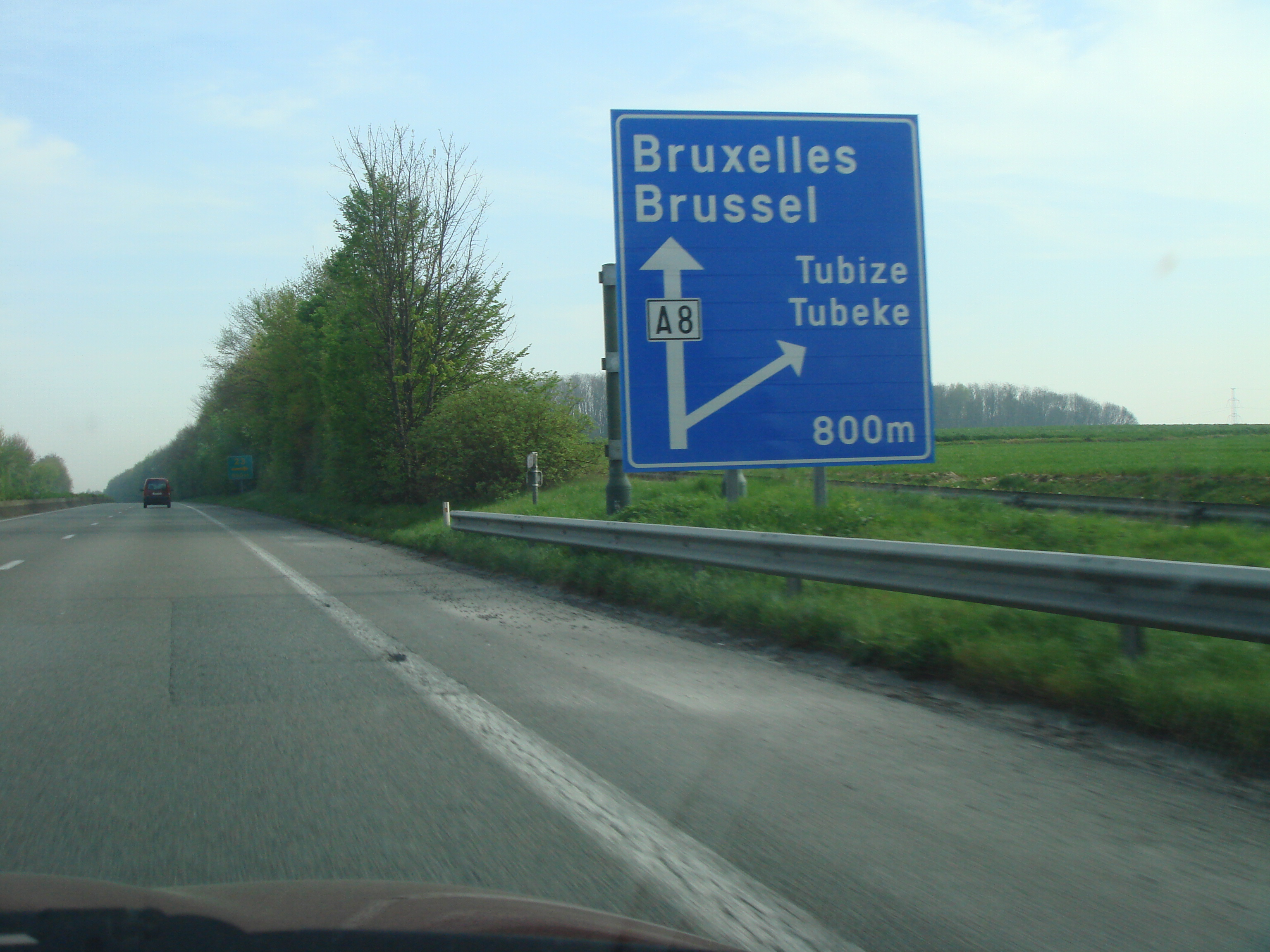 Route européenne 429